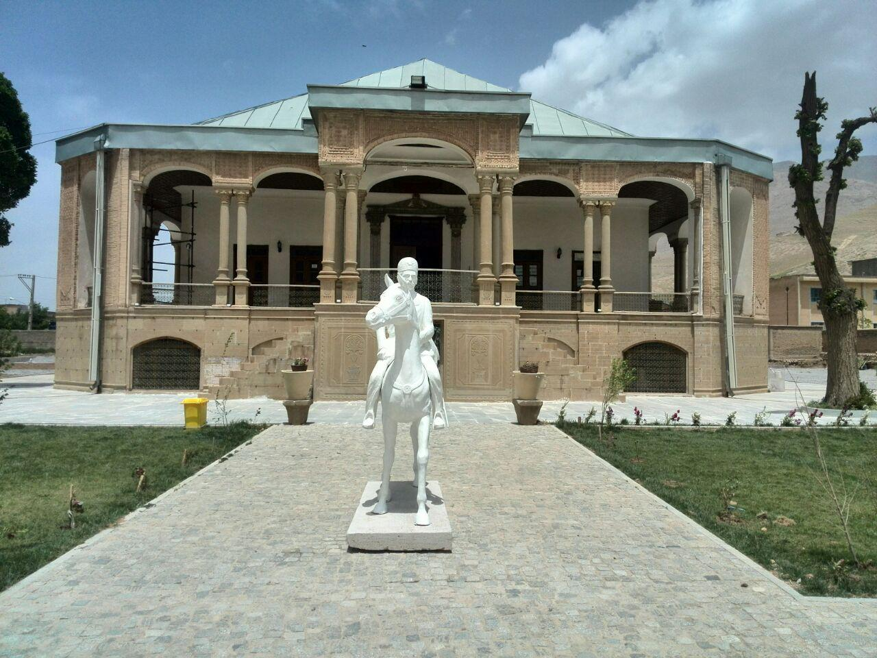 قلعه جونقان